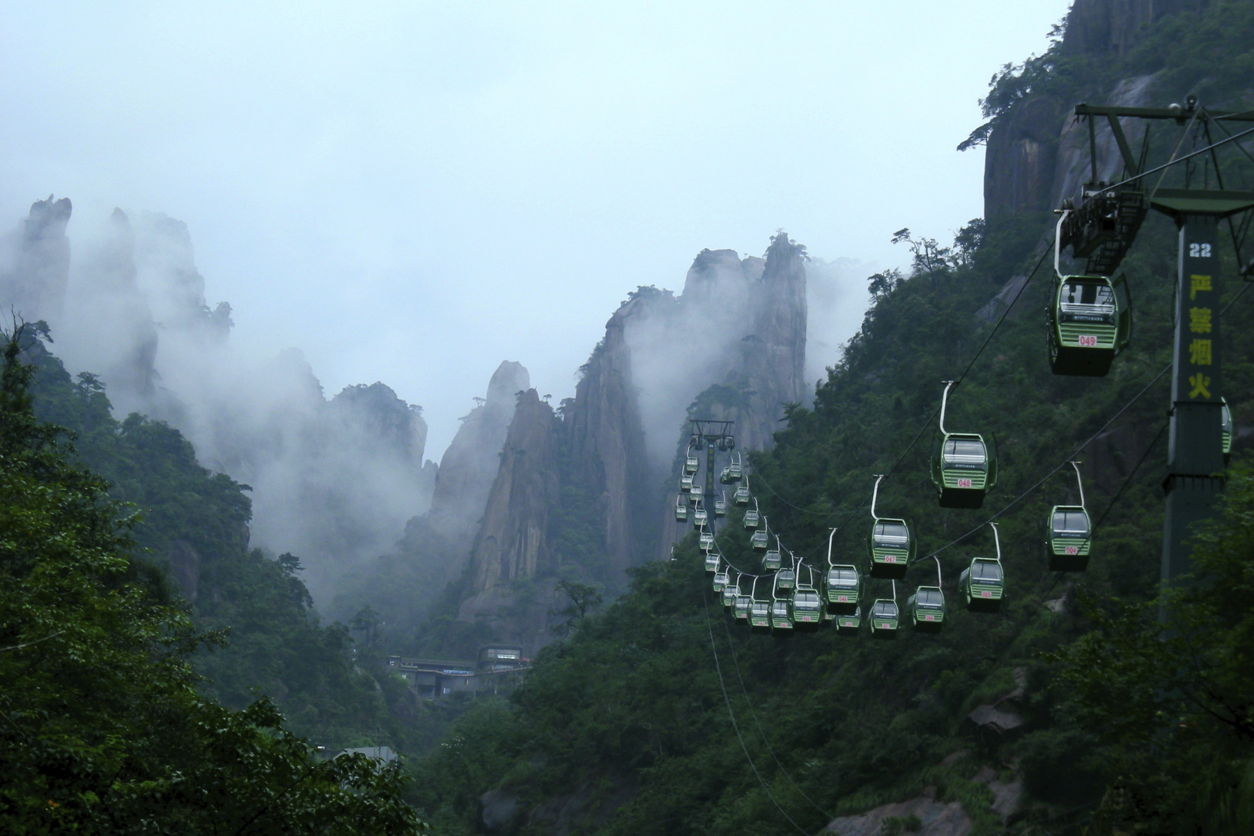 三清山外双溪（南山）索道